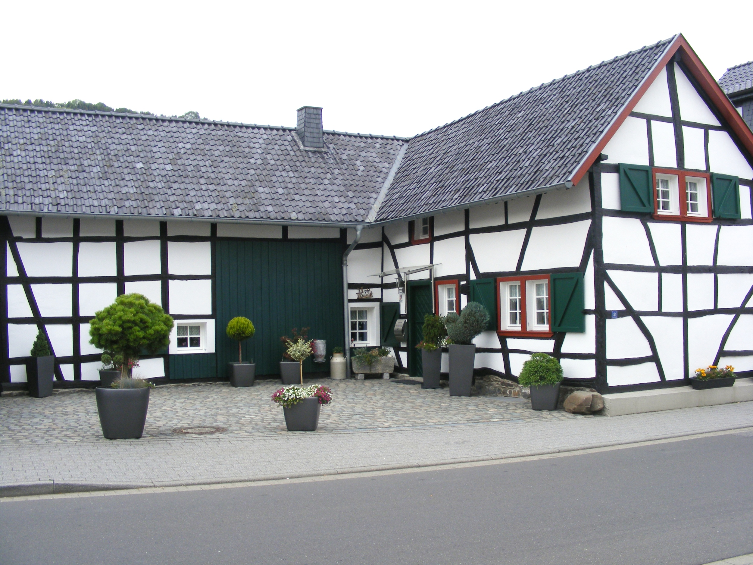 Simmerath Einruhr Rurstr 41This is a photograph of an architectural monument., no. 13